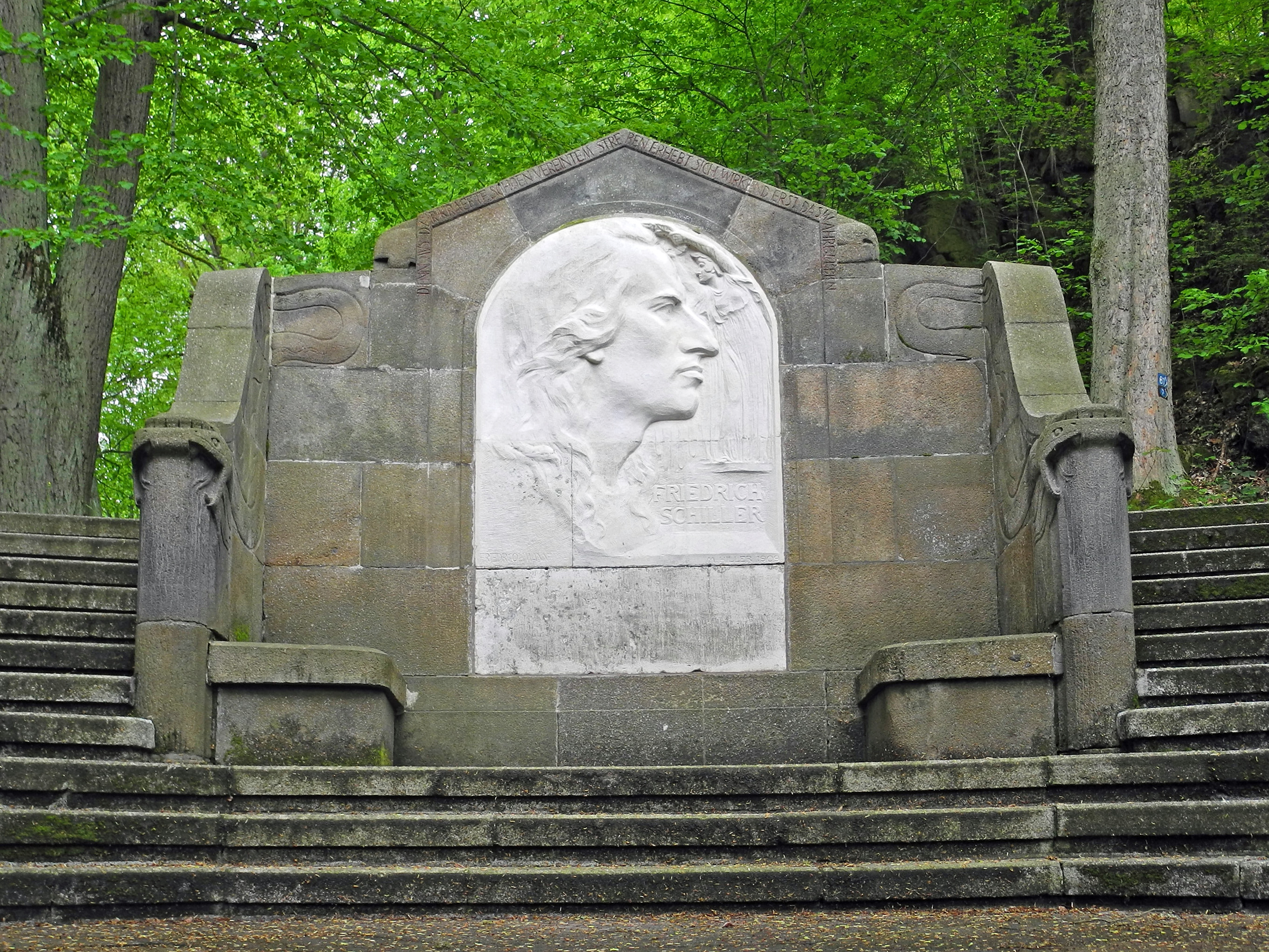 Schiller-Denkmal in Karlsbad - Karlovy Vary